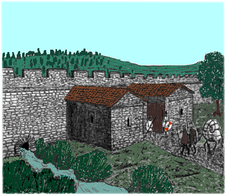 Rekonstruktionsversuch des Walltors beim Knag Burn, nahe dem Kastell Housesteads (Hadrianswall), Zustand im 4. Jahrhundert n.Chr.